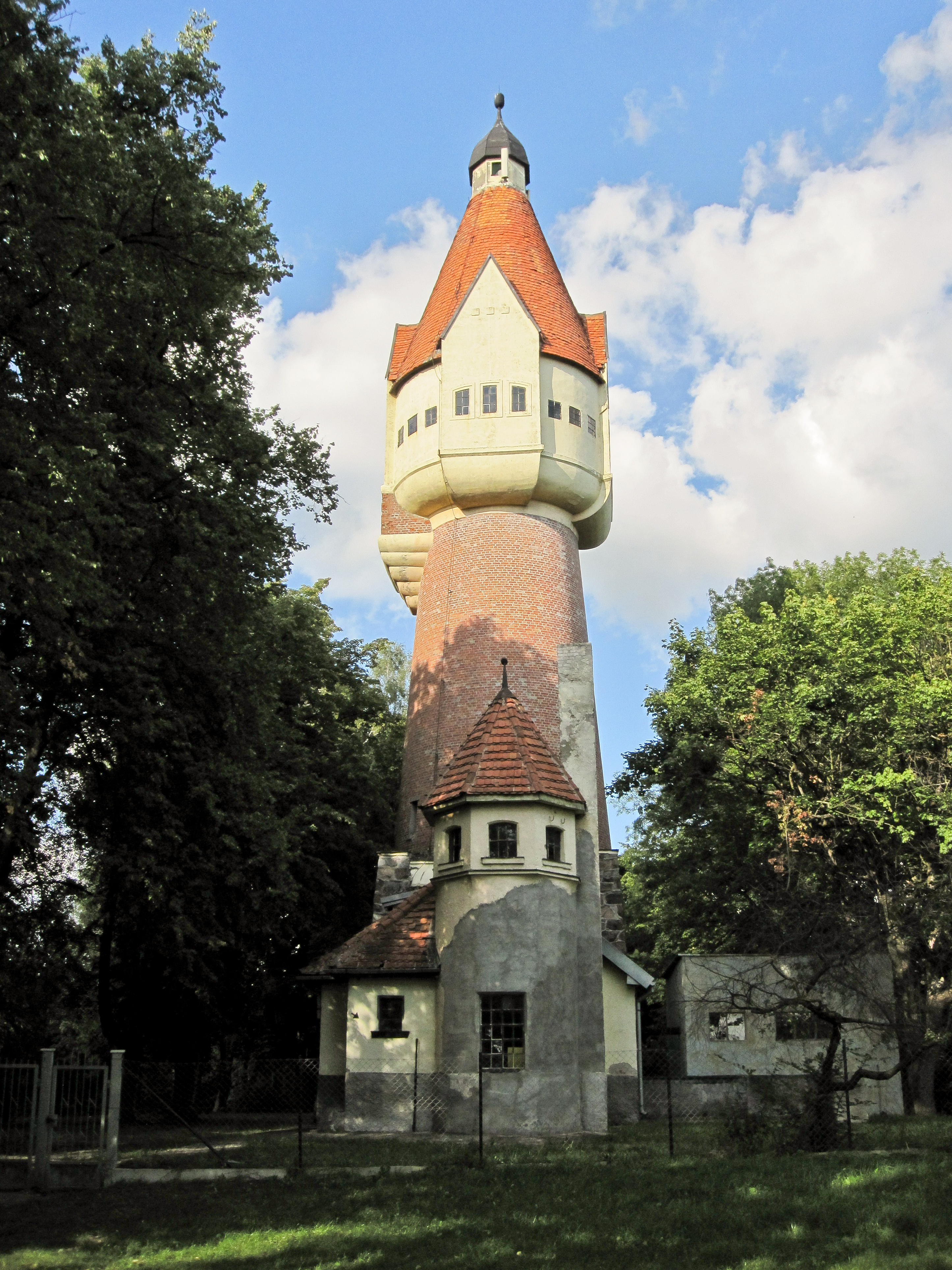 Zabytkowa, wodociągowa wieża ciśnień w miejscowości Pasym